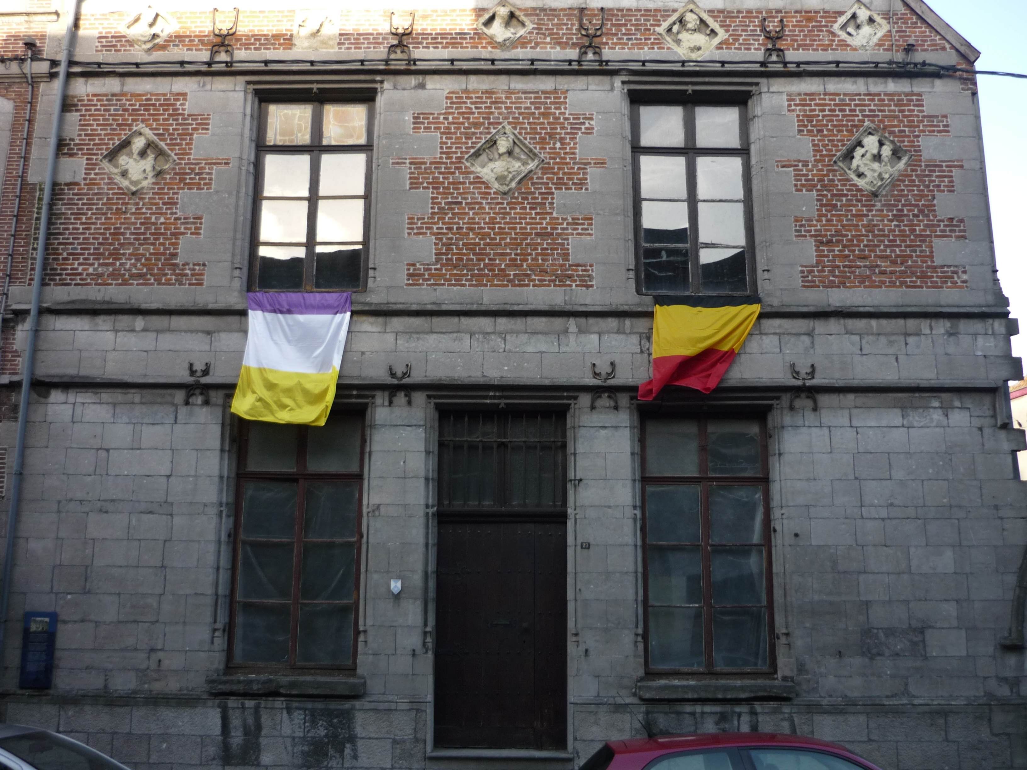 Le refuge de l'abbaye de Ghislenghien Construite pour le seigneur de Brugelette, Gabriel de Jauche-Mastaing au début du XVIe siècle, cette ancienne demeure est vendue à l'abbaye de Ghislenghien en 1646. L'abbaye la transforme alors en refuge : les religieuses s'y installent pour gérer leurs différents possessions, elle s'y replient aussi en cas de guerre. La magnifique façade gothique à deux niveaux a malheureusement été amputée du porche d'entrée lors de la seconde guerre mondiale. La façade de brique et pierre calcaire est ornée de huit cartouches en grès de style Renaissance.